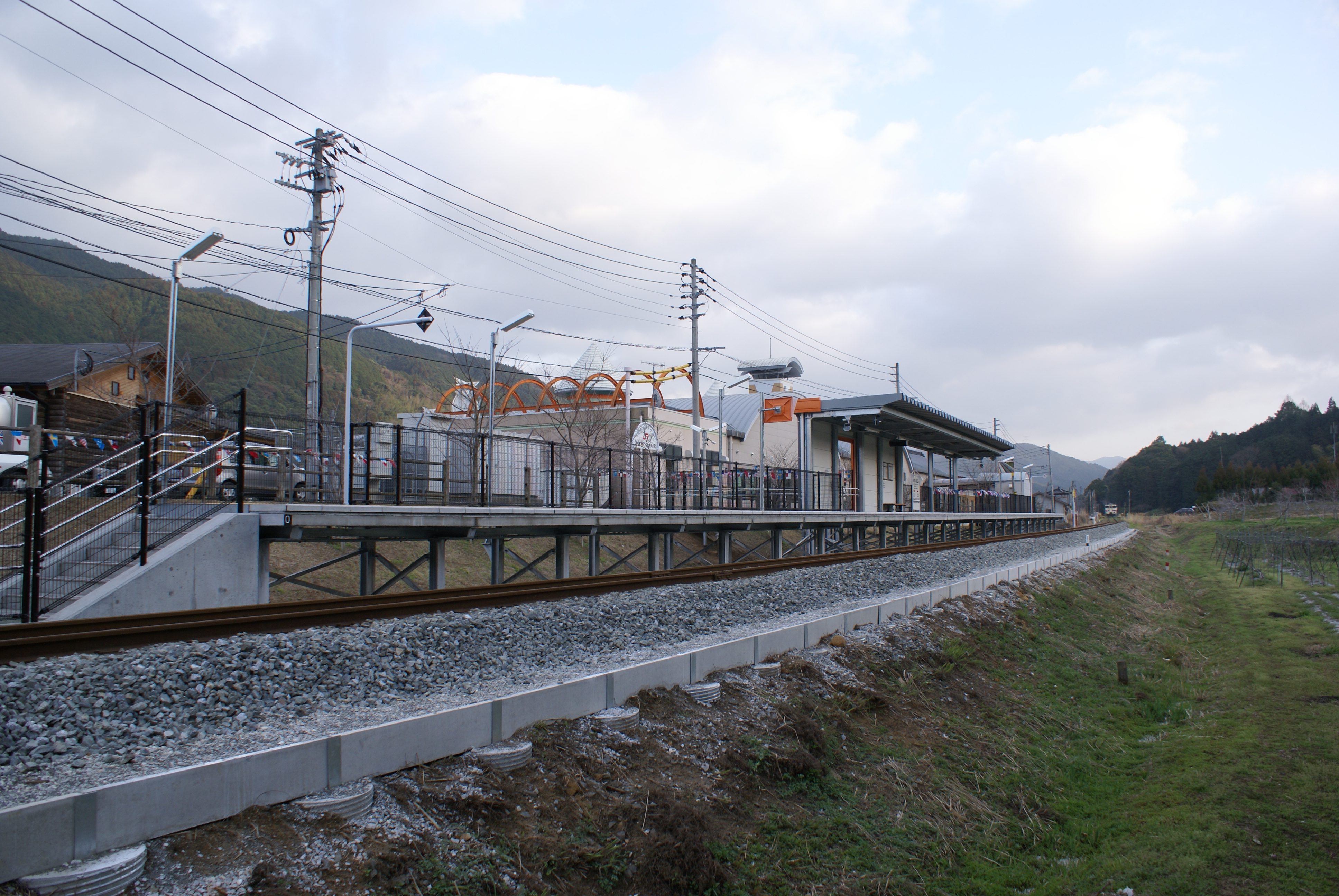 作成者：撮影者自身(Sky2) 日時：2008/03/20 著作権：